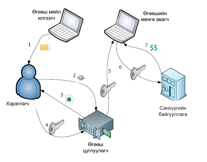 Монгол: Мөнгөний эргэлт